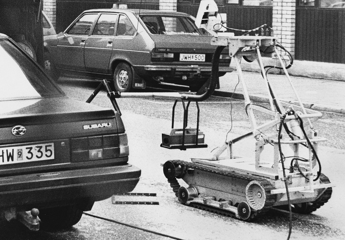 Malmöpolisens första bombrobot rullar ut på uppdrag med röntgenkameran.